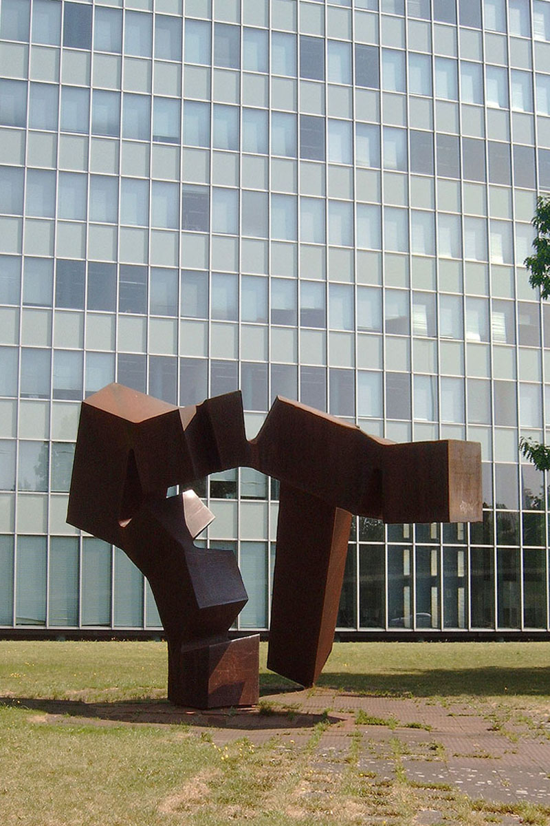 Eduardo Chillida "Monumento/Kubische Stahlplastik, 1971, - Deutschland, Nordrhein-Westfalen, Düsseldorf,Bronze, Standort vor dem Thyssen-Hochhaus